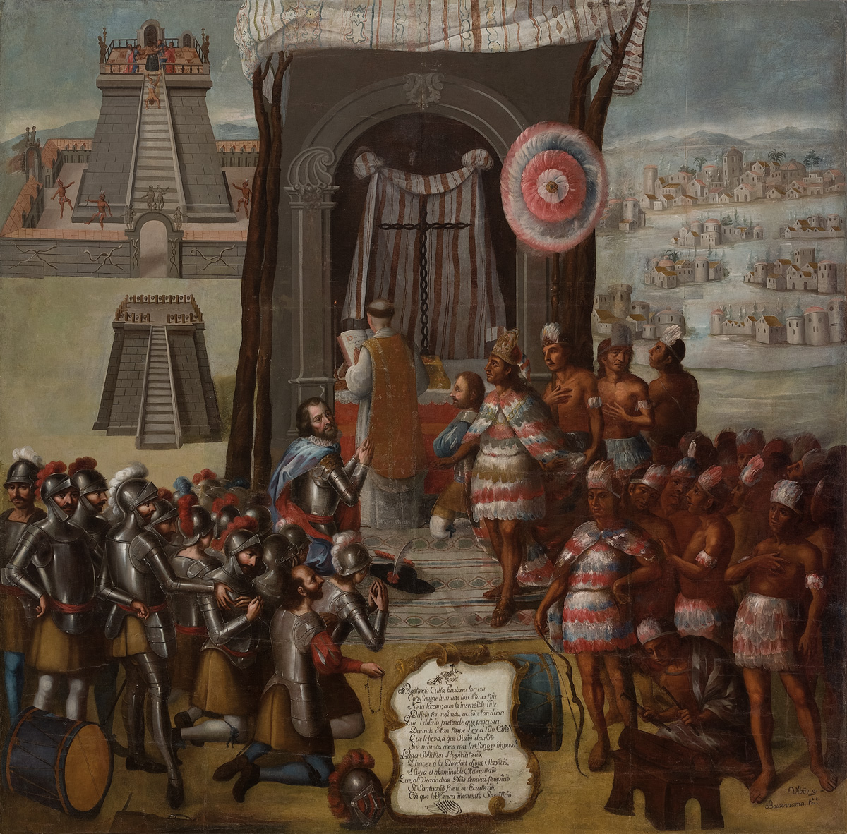 José Vivar y Valderrama (siglo XVIII). La consagración de los templos paganos y la primera misa en México-Tenochtitlan, ca. 1752. Óleo sobre tela. Museo Nacional de Historia, INAH